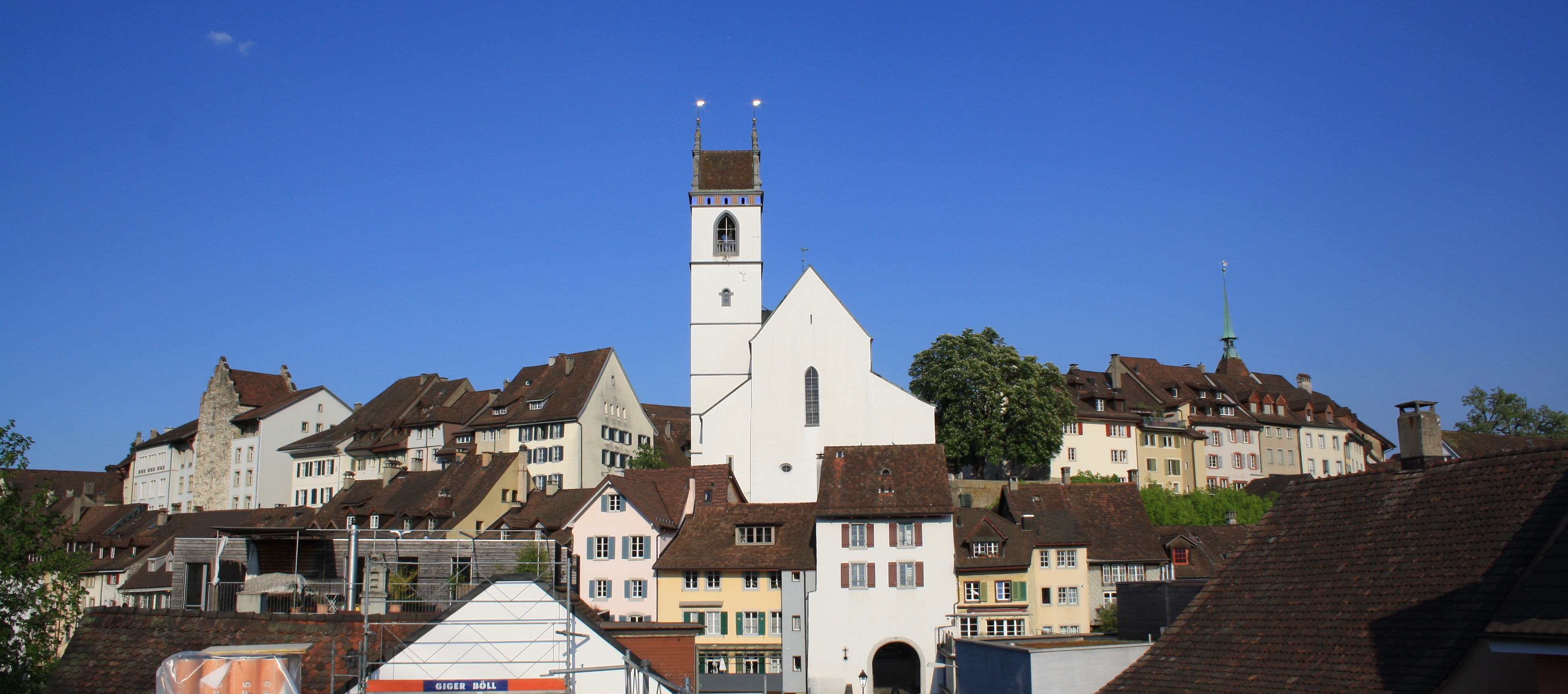 Altstadt von Aarau mit der Stadtkirche